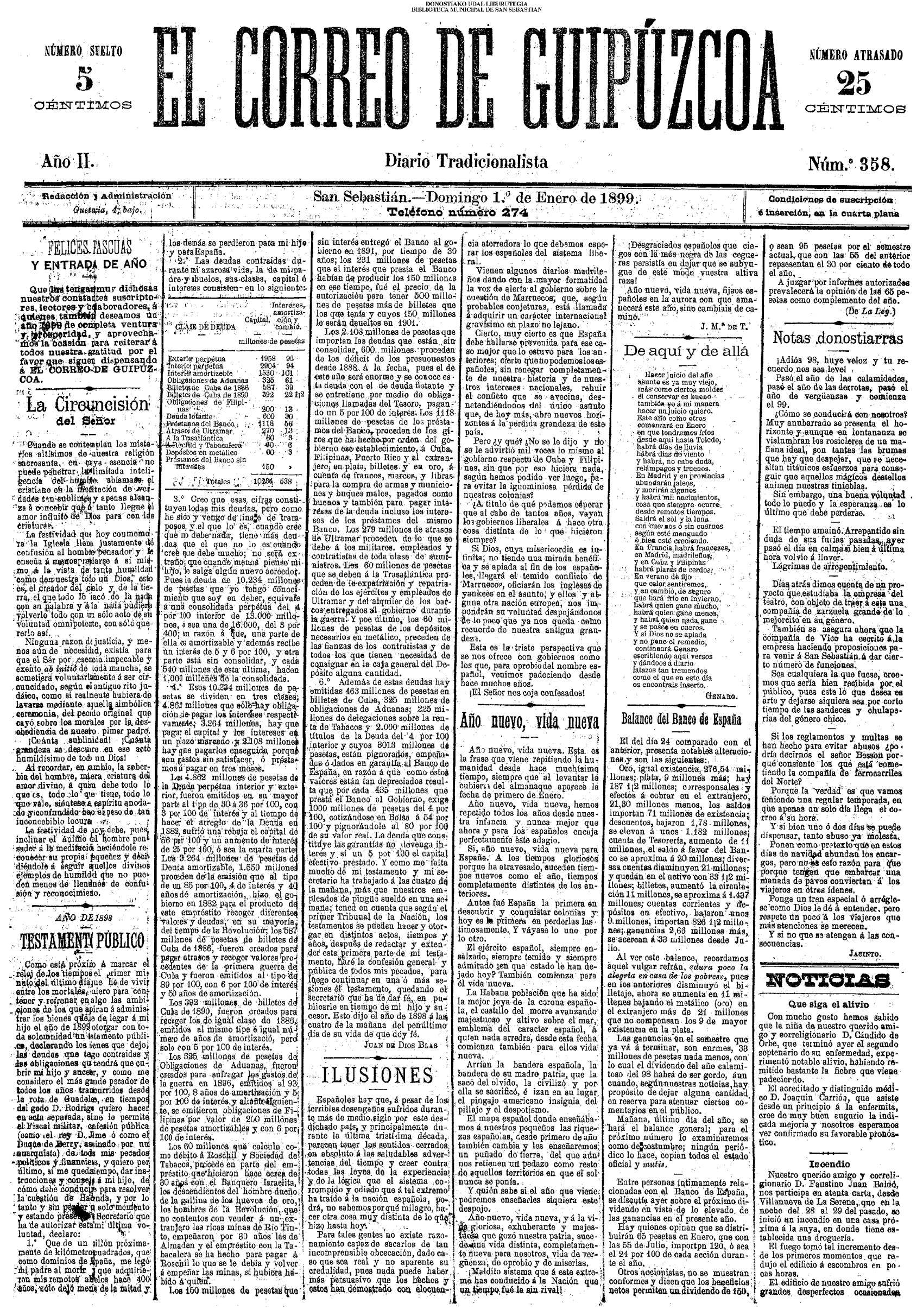 Issue of El Correo de Guipúzcoa